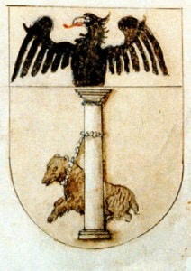 Stemma della famiglia Cesarini